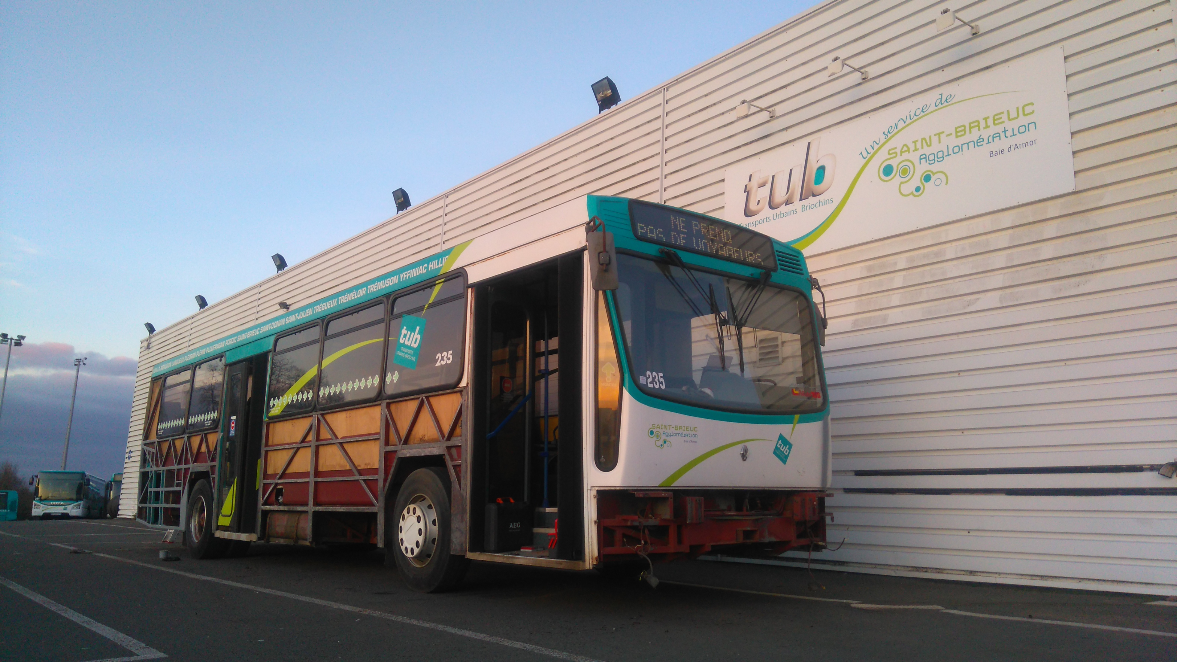 Renault PR 100.2 n°325 - HistoTUB - Restauration